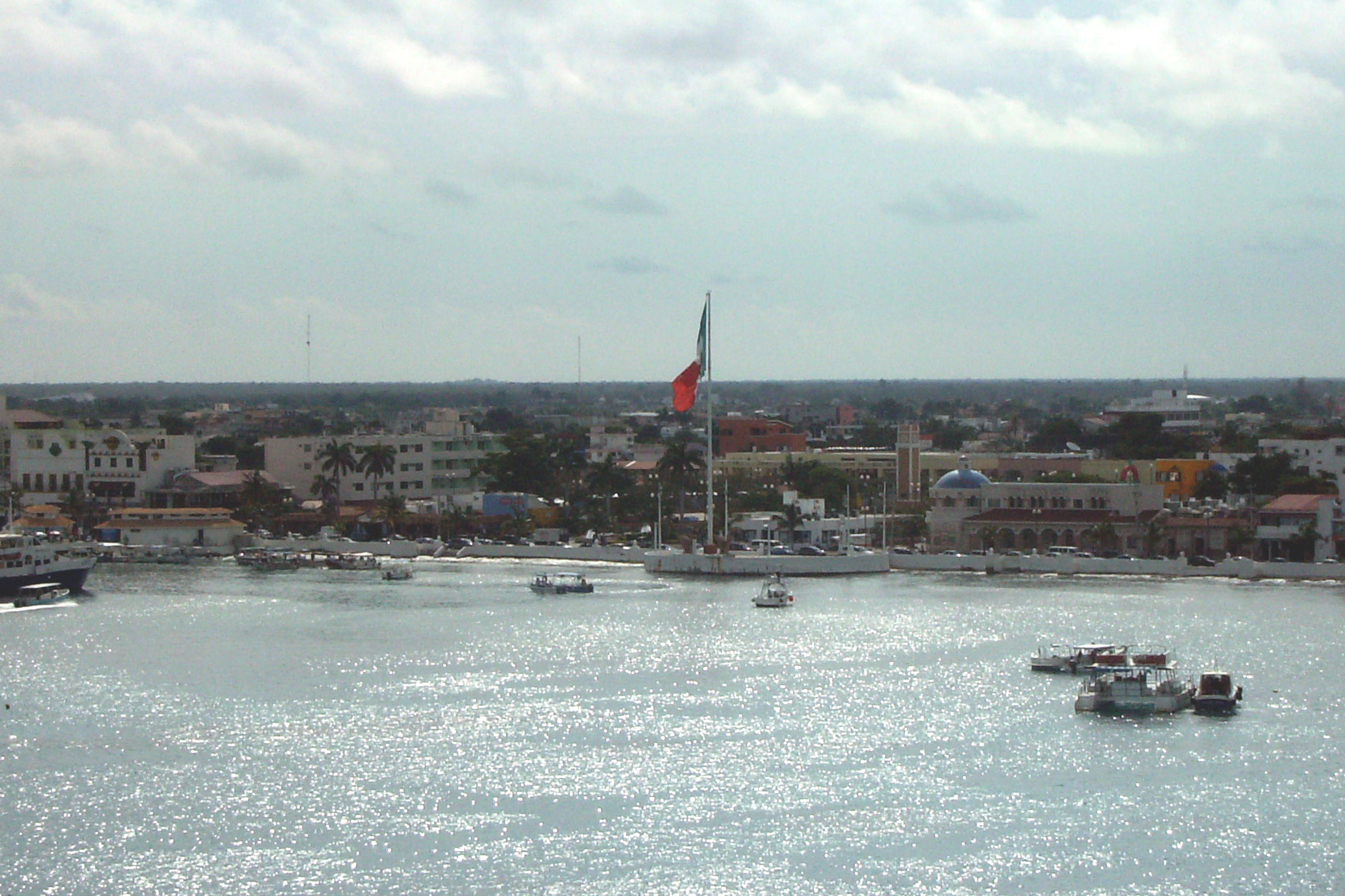 San Miguel de Cozumel, aerial view